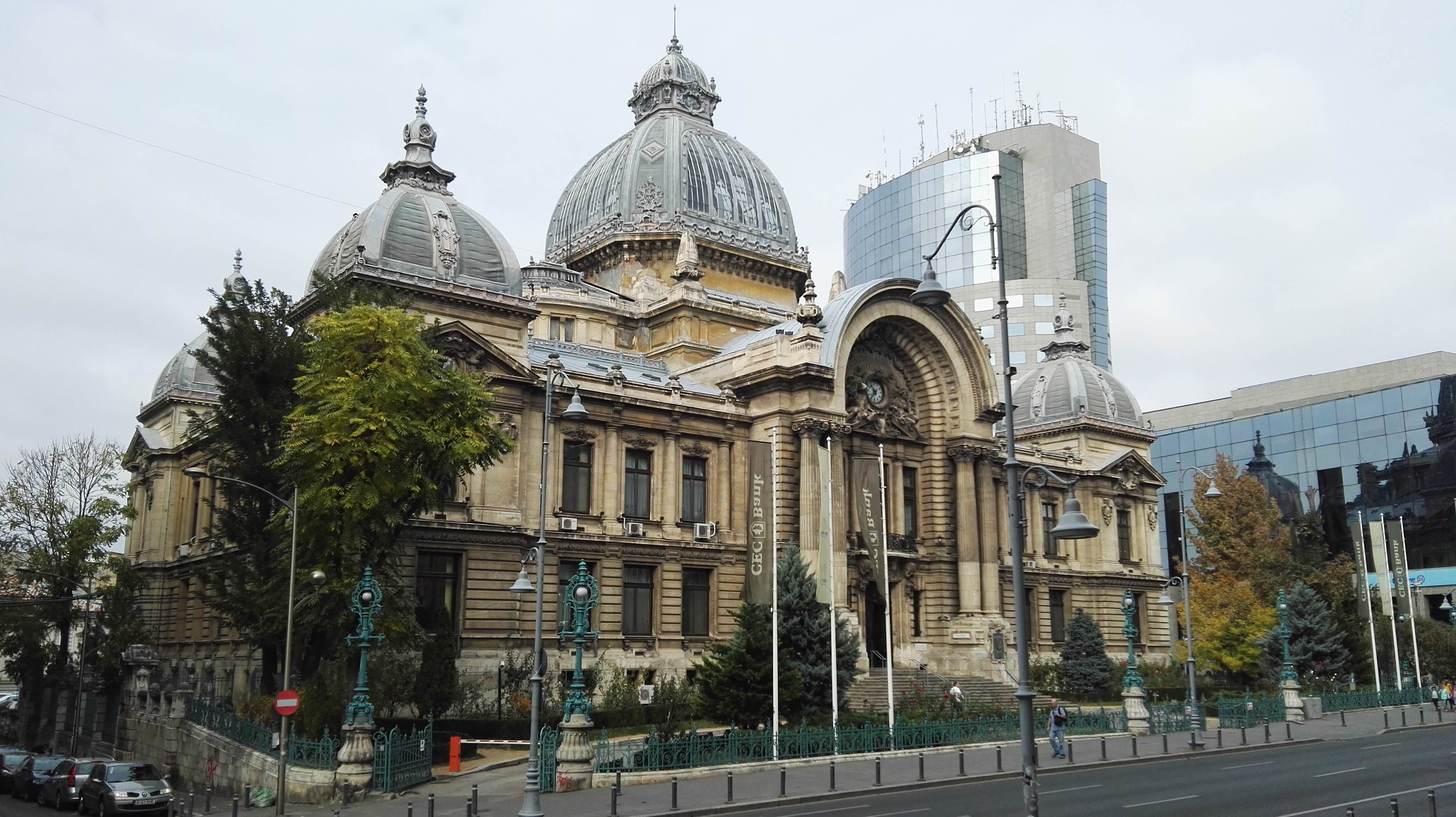 CEC Palace in Bukarest